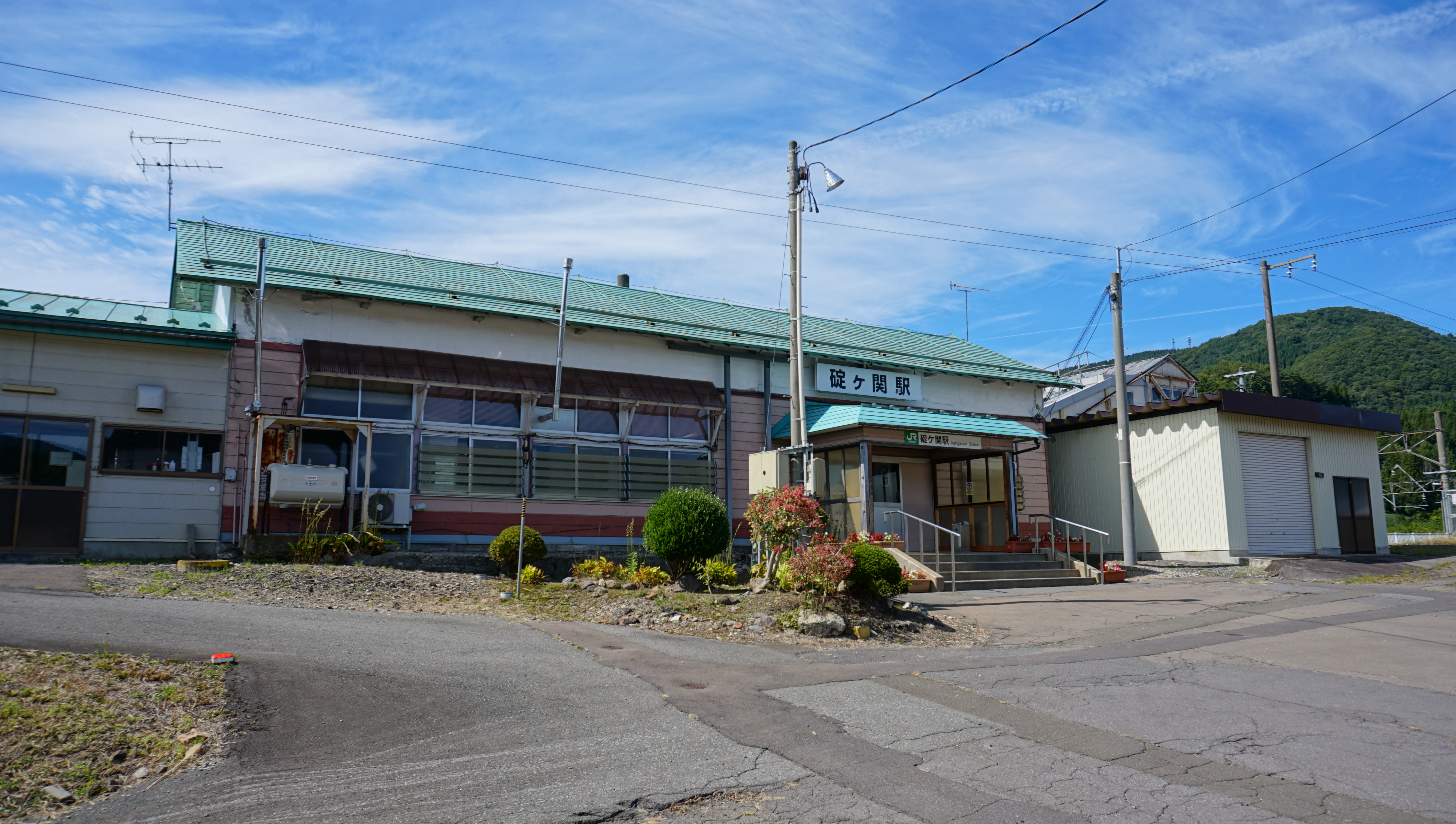 奥羽本線 碇ヶ関駅（青森県平川市）